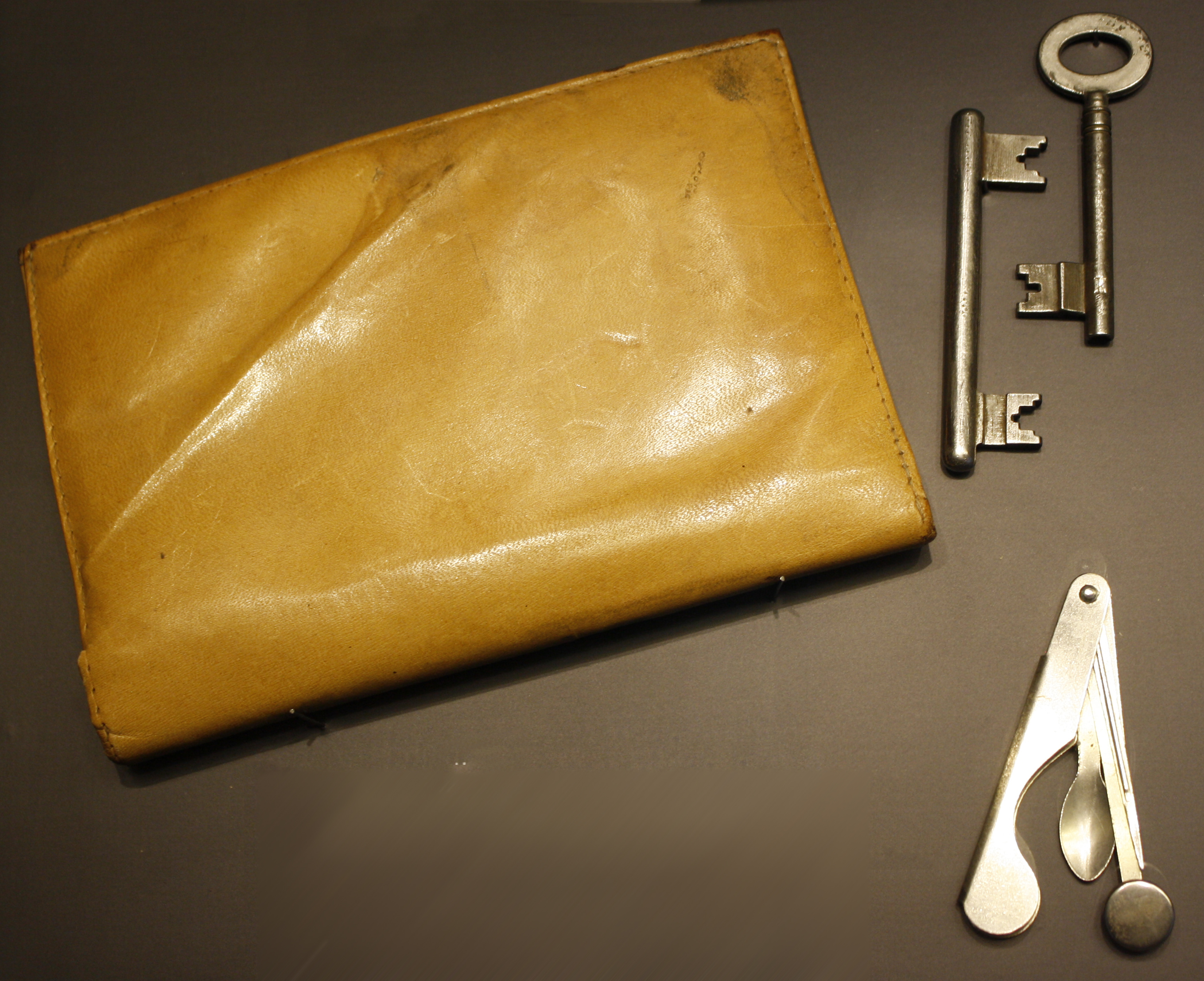 Gerald_Thiem_Personal_Belongings